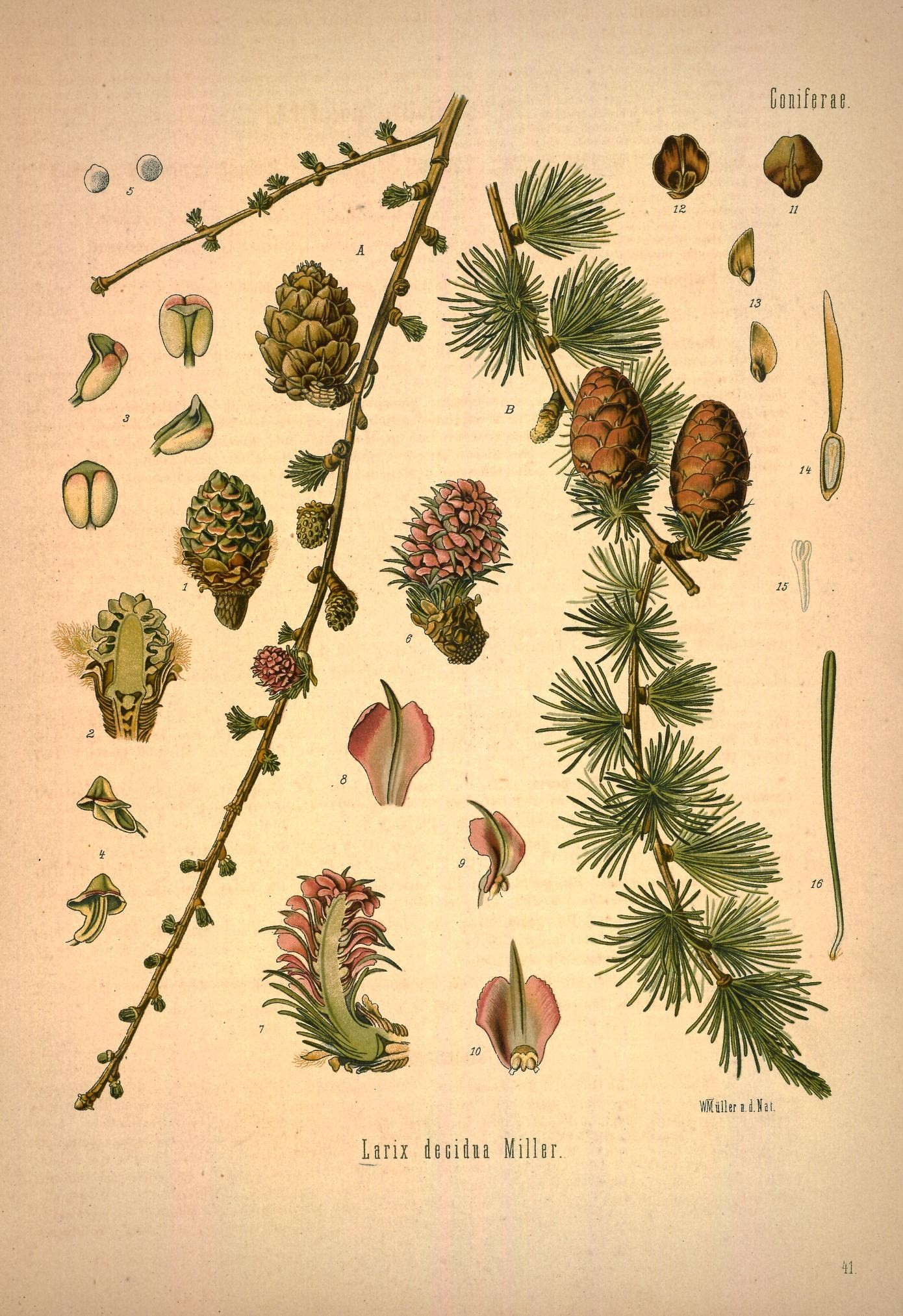 Köhler's Medizinal-Pflanzen in naturgetreuen Abbildungen mit kurz erläuterndem Texte : Atlas zur Pharmacopoea germanica, austriaca, belgica, danica, helvetica, hungarica, rossica, suecica, Neerlandica, British pharmacopoeia, zum Codex medicamentarius, sowie zur Pharmacopoeia of the United States of America. Europäische Lärche. A blühender, B fruchtender Zweig in natürl. Grösse; 1 männliche Blüthe, vergrössert; 2 dieselbe im Längsschnitt, desgl.; 3 u. 4 Staubgefässe von verschiedenen Seiten, geschlossen und geöffnet, desgl.; 5 Pollen, desgl.; 6 weibliche Blüthe, desgl.; 7 dieselbe im Längsschnitt, desgl.; 8, 9, 10 Deckschuppen von verschiedenen Seiten, desgl.; 11, 12 Fruchtschuppen von vorn und von der Rückseite, desgl.; 13 Same, natürl. Grösse; 14 derselbe im Längsschnitt, vergrössert; 15 Embryo, desgl.; 16 Nadel, desgl.